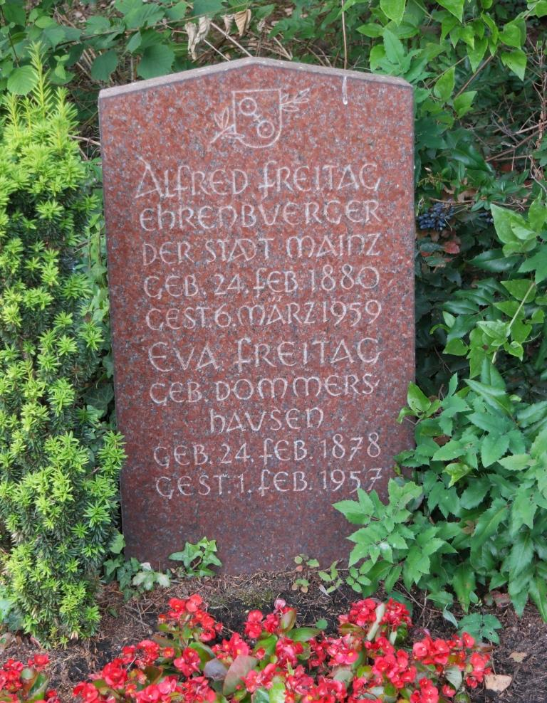 Grab des Kommunalpolitikers Alfred Freitag, 1880-1959, auf dem Hauptfriedhof Mainz